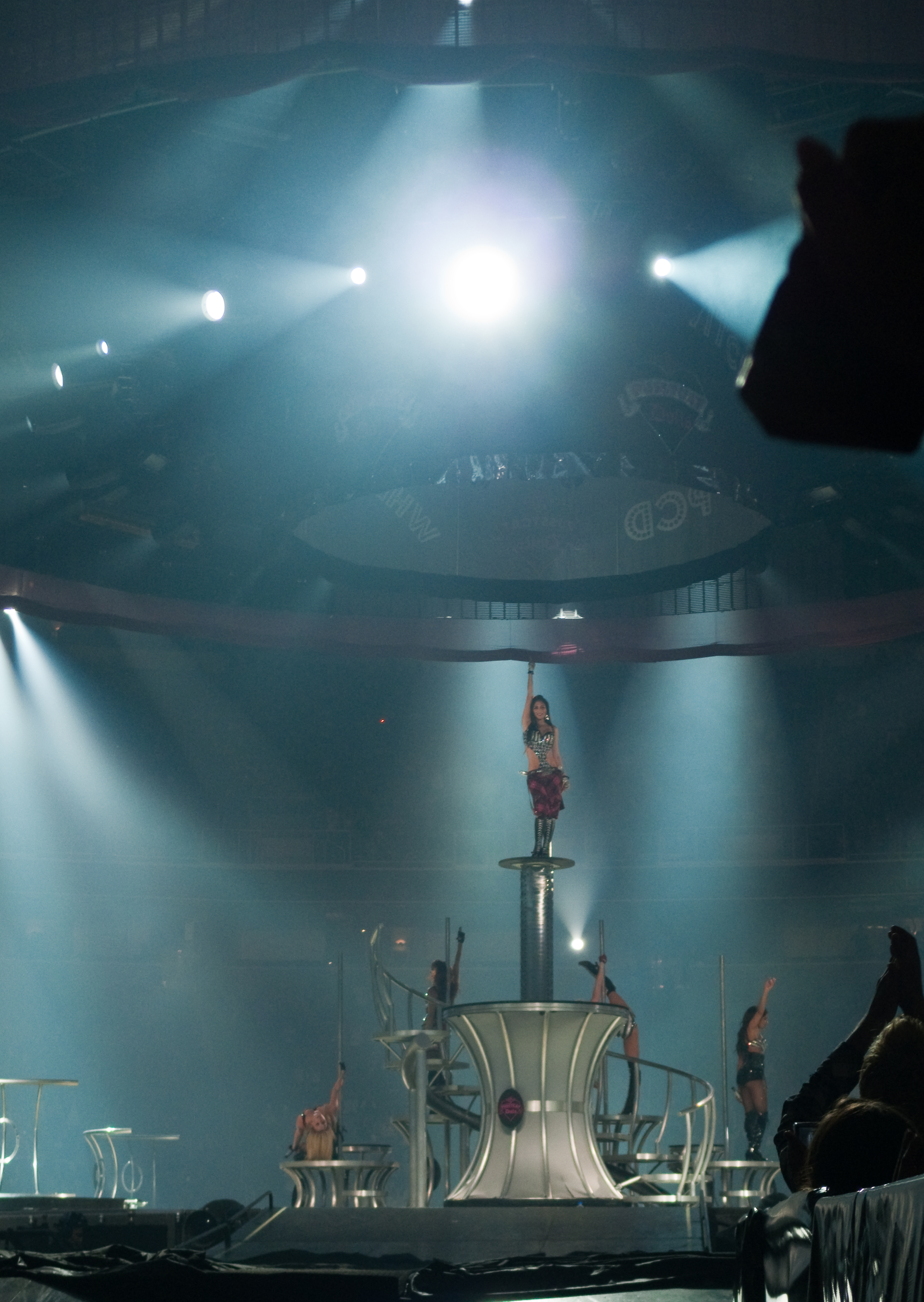 The Pussycat Dolls na abertura do turnê de Britney Spears.